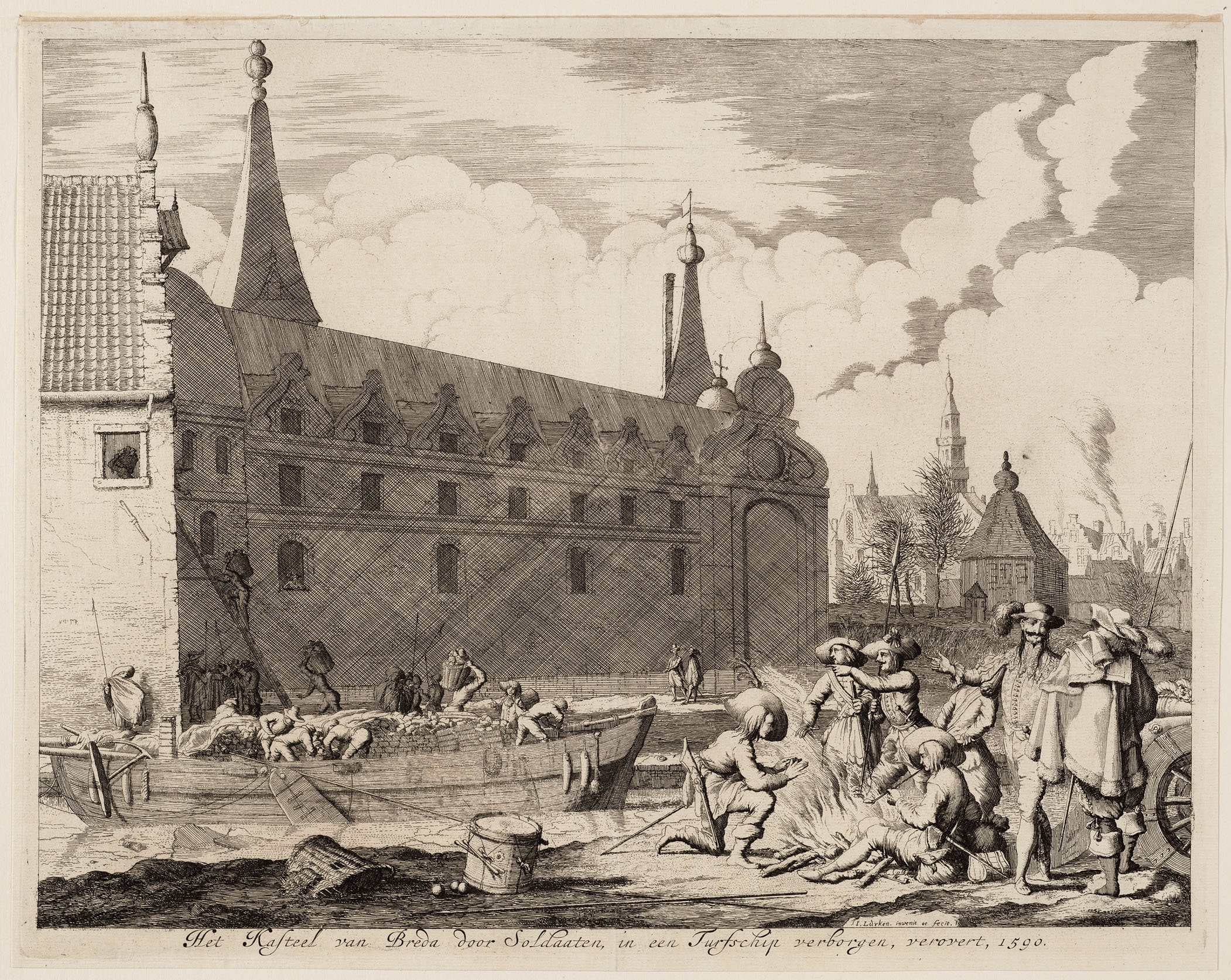 Veroveringe van ´t kasteel van Breda door soldaaten, in een turfschip verborgen, Ao 1590